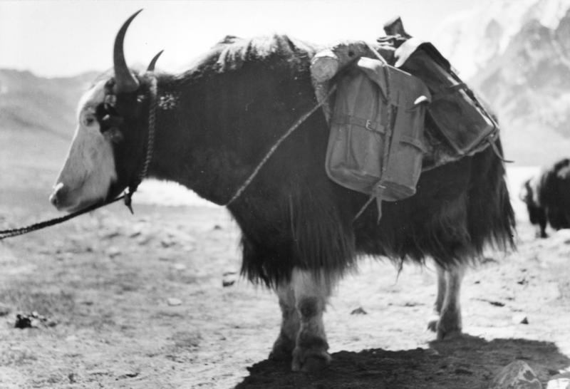 Tibetexpedition, Jak Lachen, Yak [Yak, Jak]